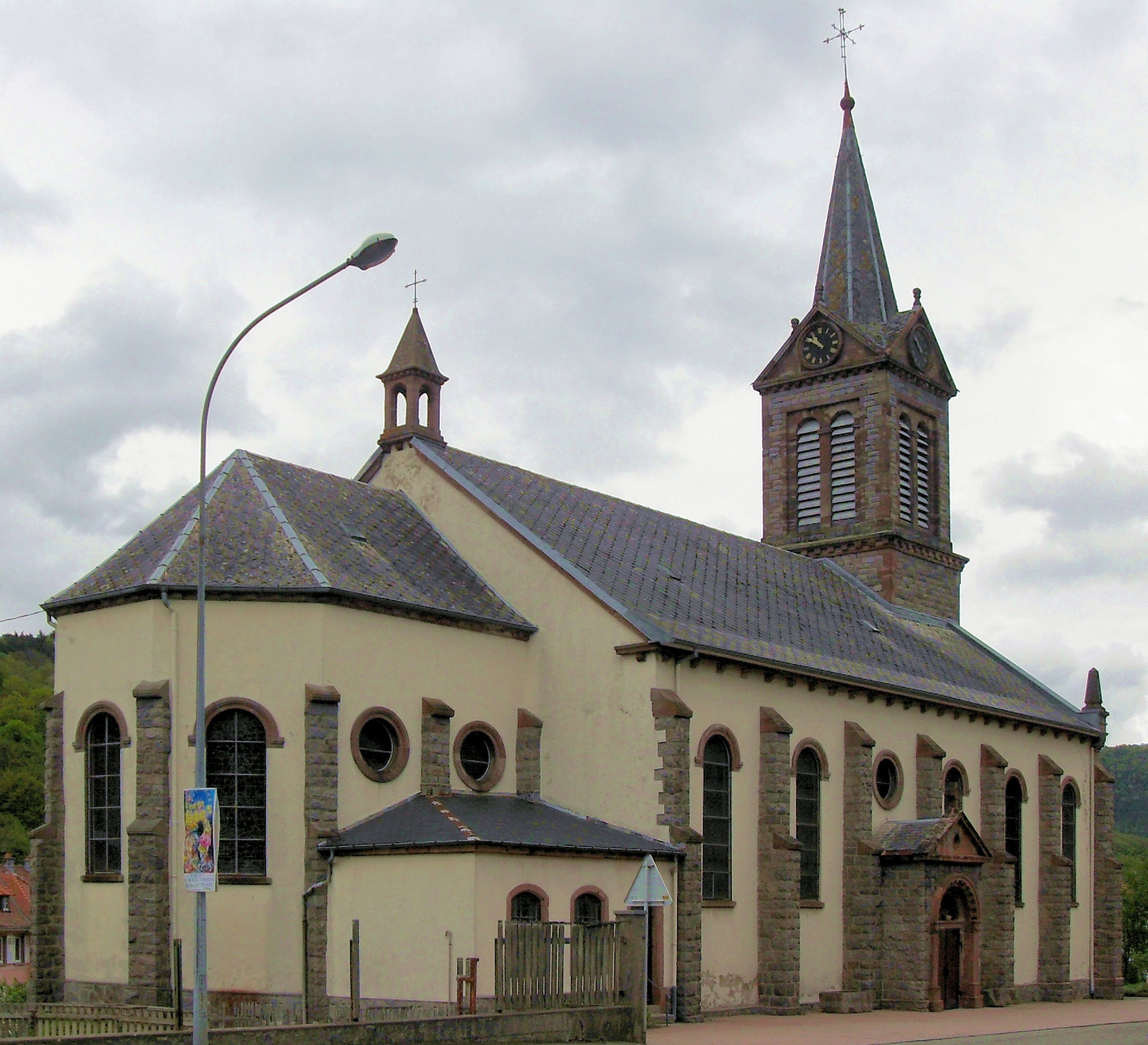 L'église Sainte-Richarde d'Hachimette, commune de Lapoutroie